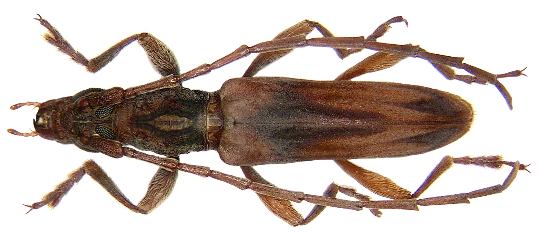 Familie: Cerambycidae Grösse: 13,5 mm Fundort: Malaysia, Borneo, Sabah leg. T.W.Meng, 2004; det. A.Weigel Foto: U.Schmidt, 2007